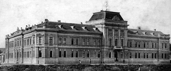 Српски (ћирилица): Данашња зграда универзитета, Ниш